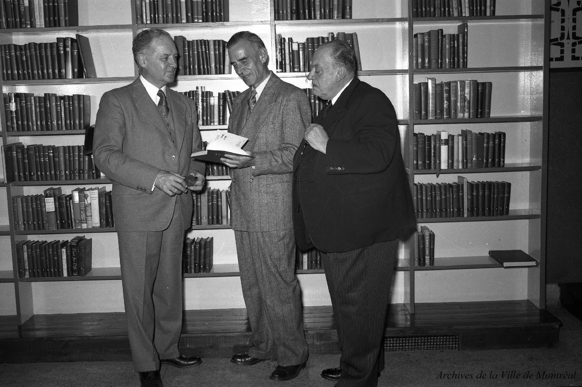 Inauguration de la bibliothèque Shamrock, 1947 « En 1947, dans l’édifice du marché Jean-Talon, on inaugure la première bibliothèque de quartier, la succursale Shamrock, en présence du maire Camillien Houde. Cette succursale deviendra la bibliothèque Le Prévost sur Christophe-Colomb à compter de la décennie 1980. »